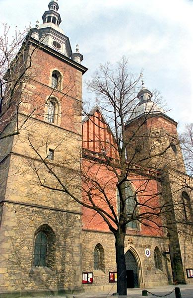 Nowy Sacz Church in Poland